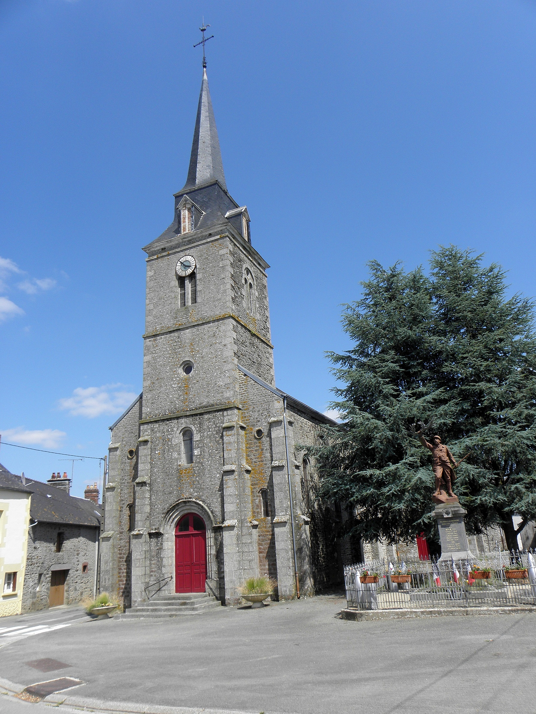 Église Saint-Martin de Chevaigné-du-Maine (53).